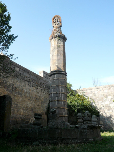 Татев, газаван 97/9.30